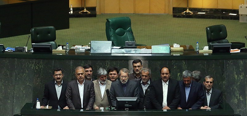 انتخابات هیئت‌ رئیسه دائم مجلس دهم ایران